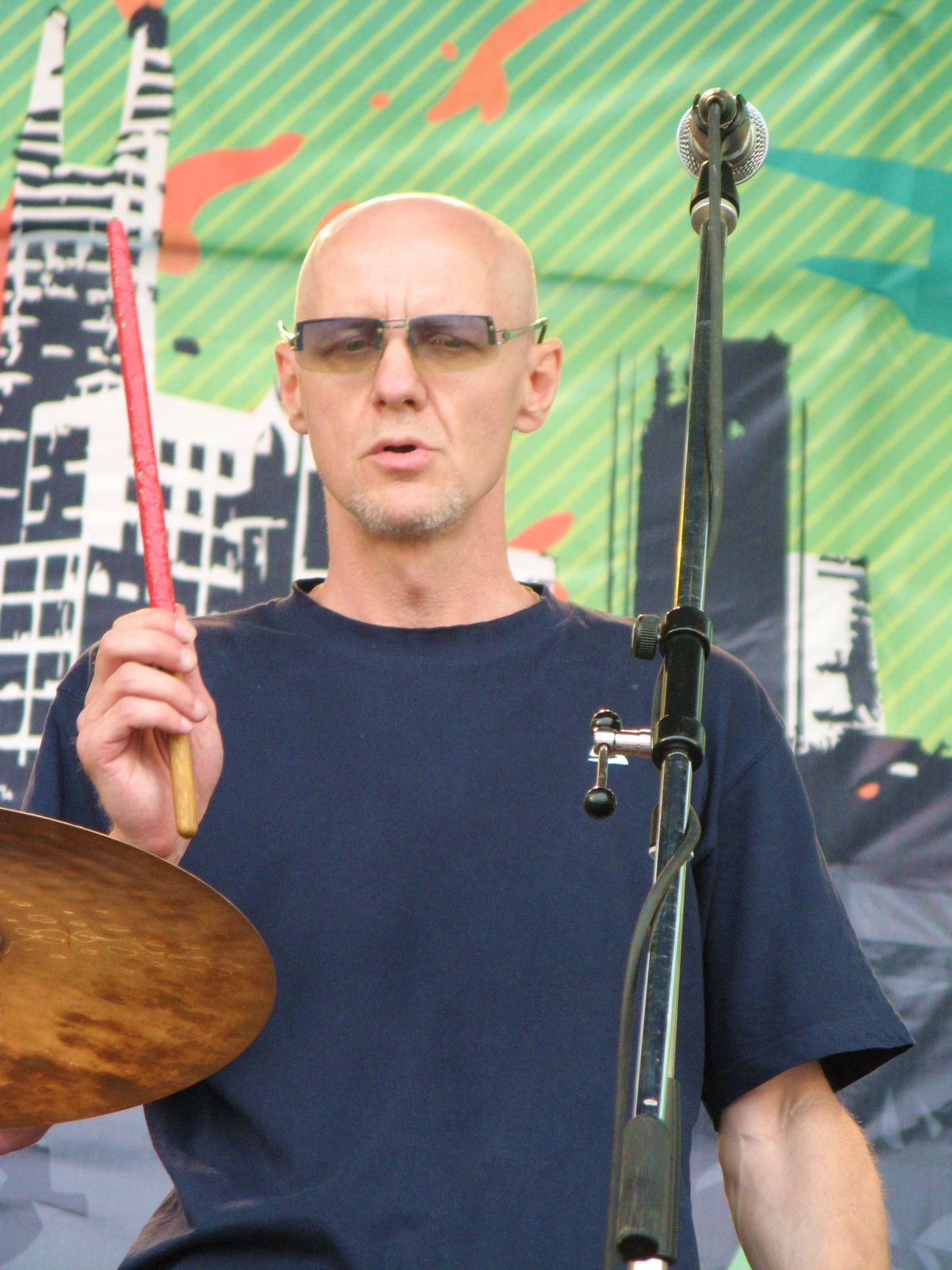 Группа "Контора Кука" на фестивале "Rock-Line-2010"